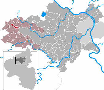 Welschenbach in Rhineland-Palatinate - district Mayen-Koblenz